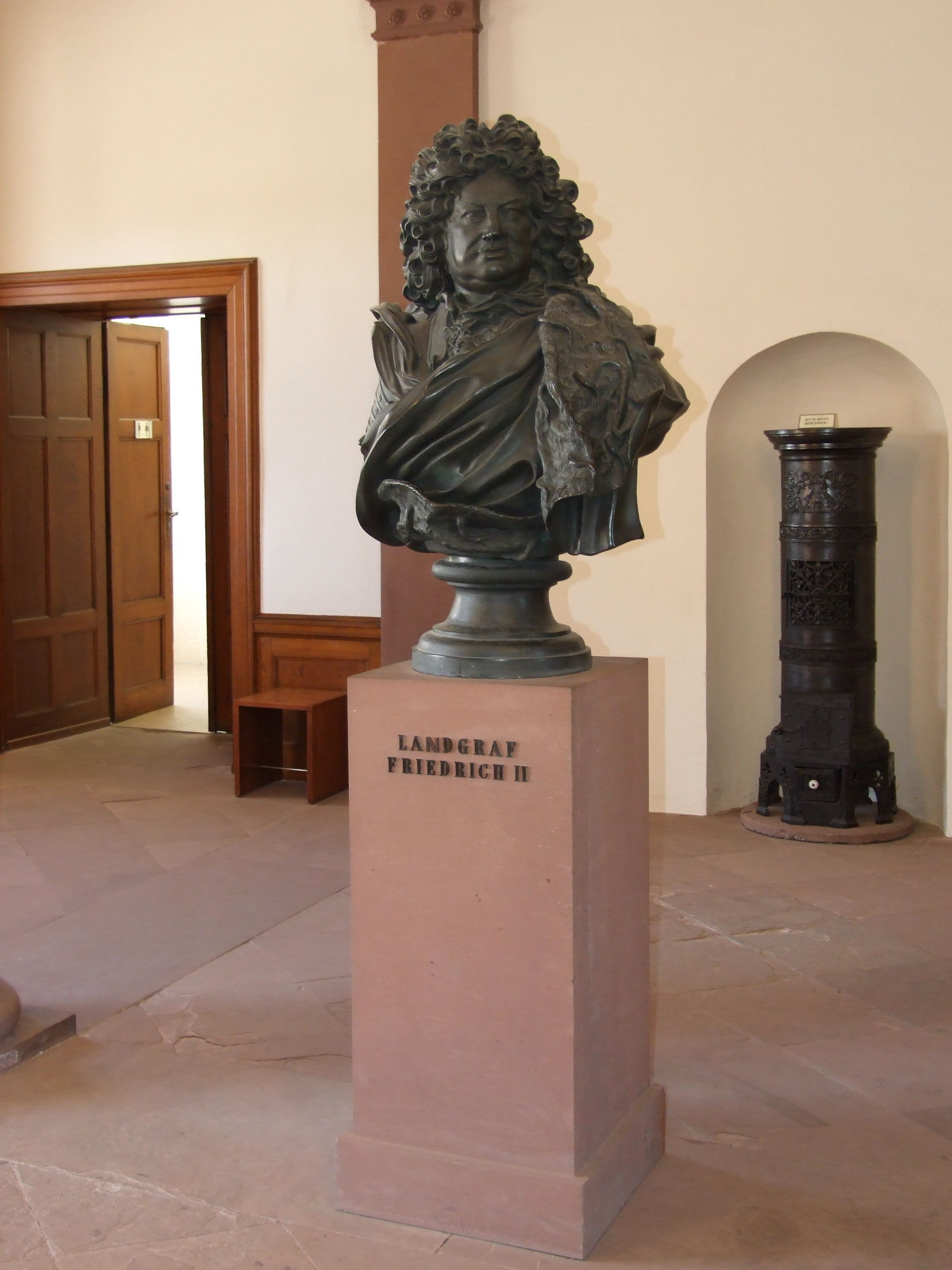 Schloss in Bad Homburg, Bueste des Landgrafen Friedrich II. von Andreas Schlüter